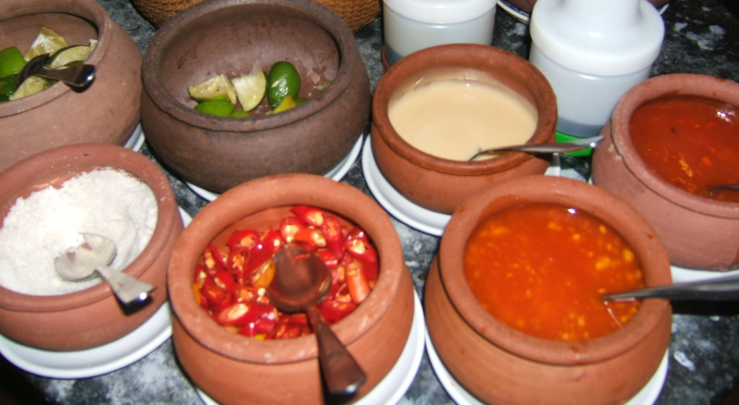 Ảnh do Khương Việt Hà chụp tại Quán Sen, Hà Nội